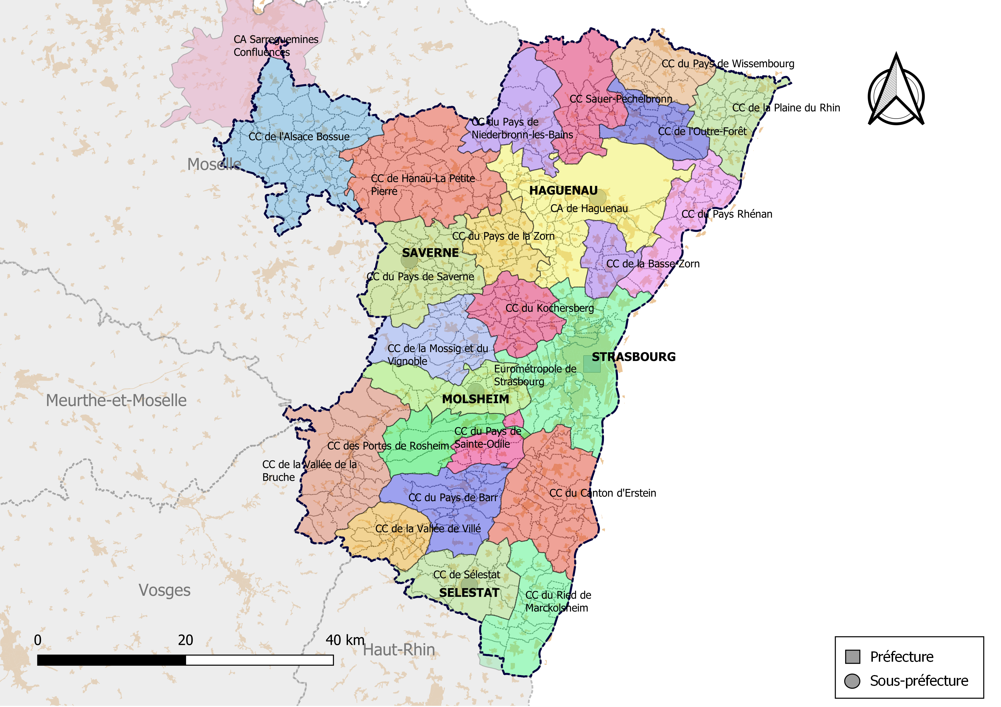 Carte des intercommunalités du département du Bas-Rhin, France. Composition au 1er janvier 2019.